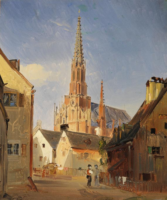 Blick auf die Mariahilf-Kirche in München. Öl auf Papier, 29,5 x 24,5 cm.